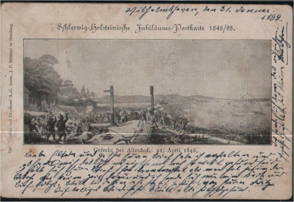 Gefecht bei Altenhof 1848 auf Postkarte von 1898. Hersteller der Postkarte war die Verlagsanstalt und Druckerei A.-G. (vormals J. F. Richter) in Hamburg (1888–1905)[1]